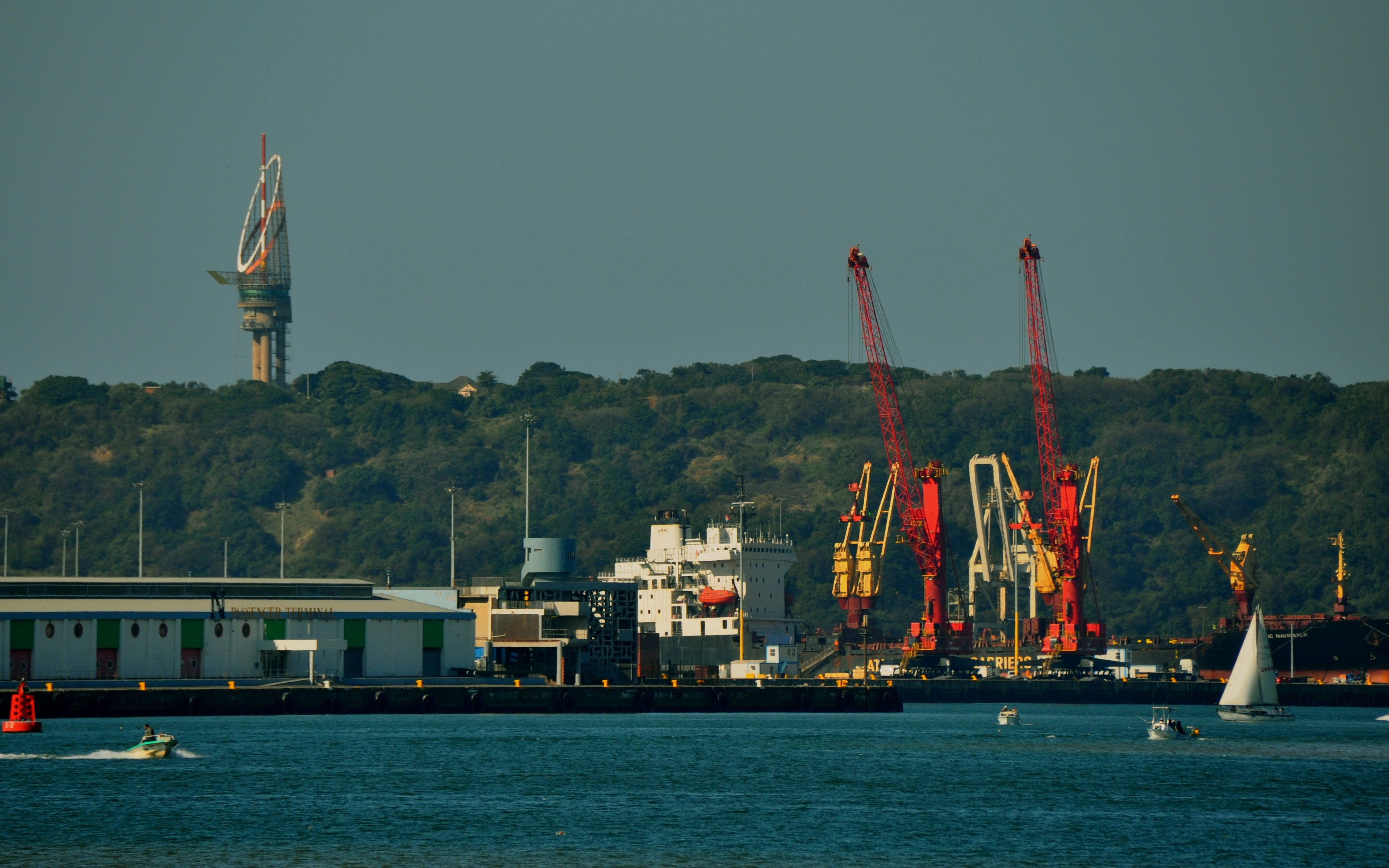 Hafen Durban mit dem Millenium Tower auf dem Hügelzug Bluff. Im Vordergrund ein Teil des RoRo-Terminals mit den beiden Liebherr LHM550C Kranen.